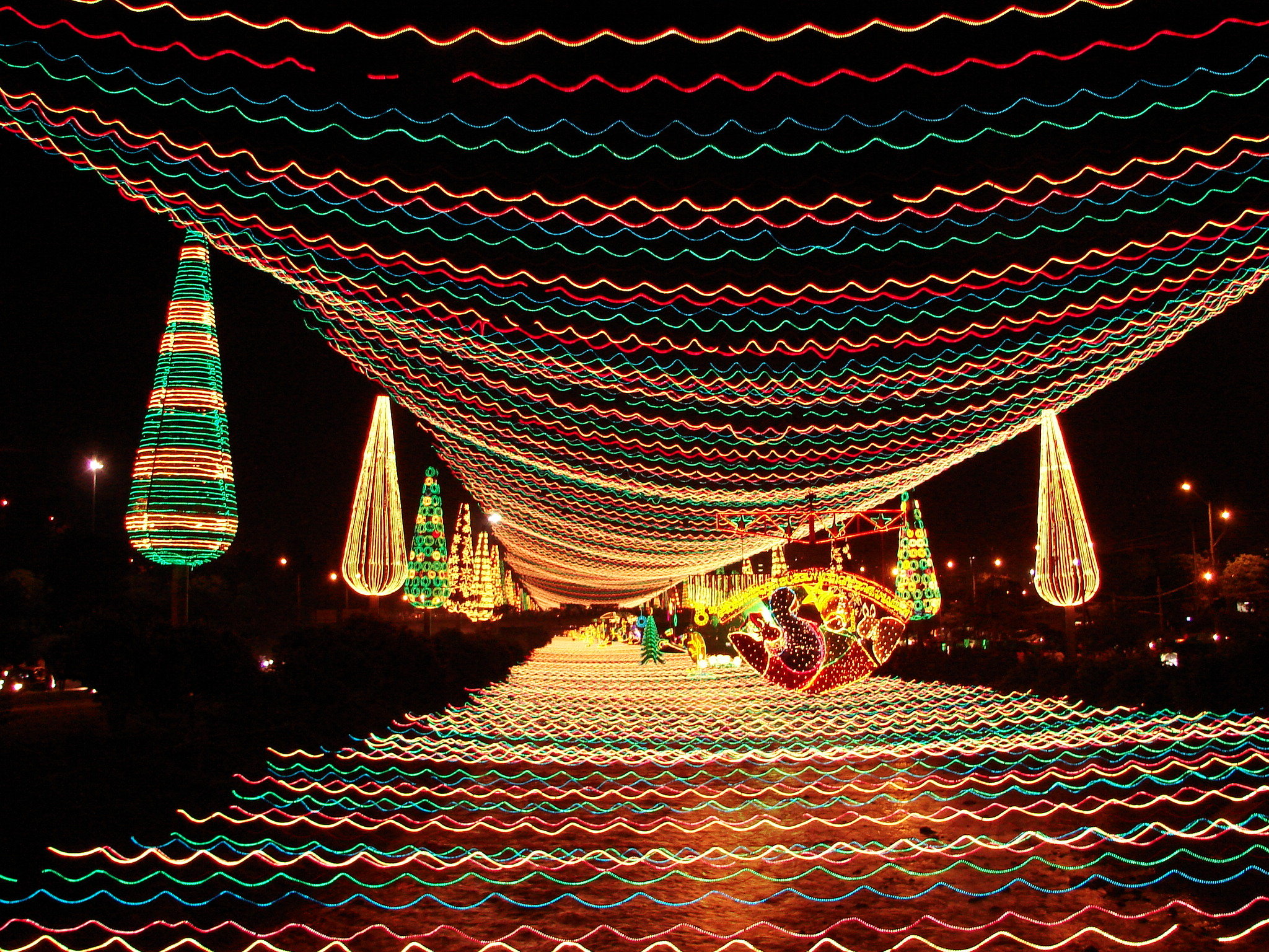 Alumbrados en el Río Medellín, diciembre 2007.